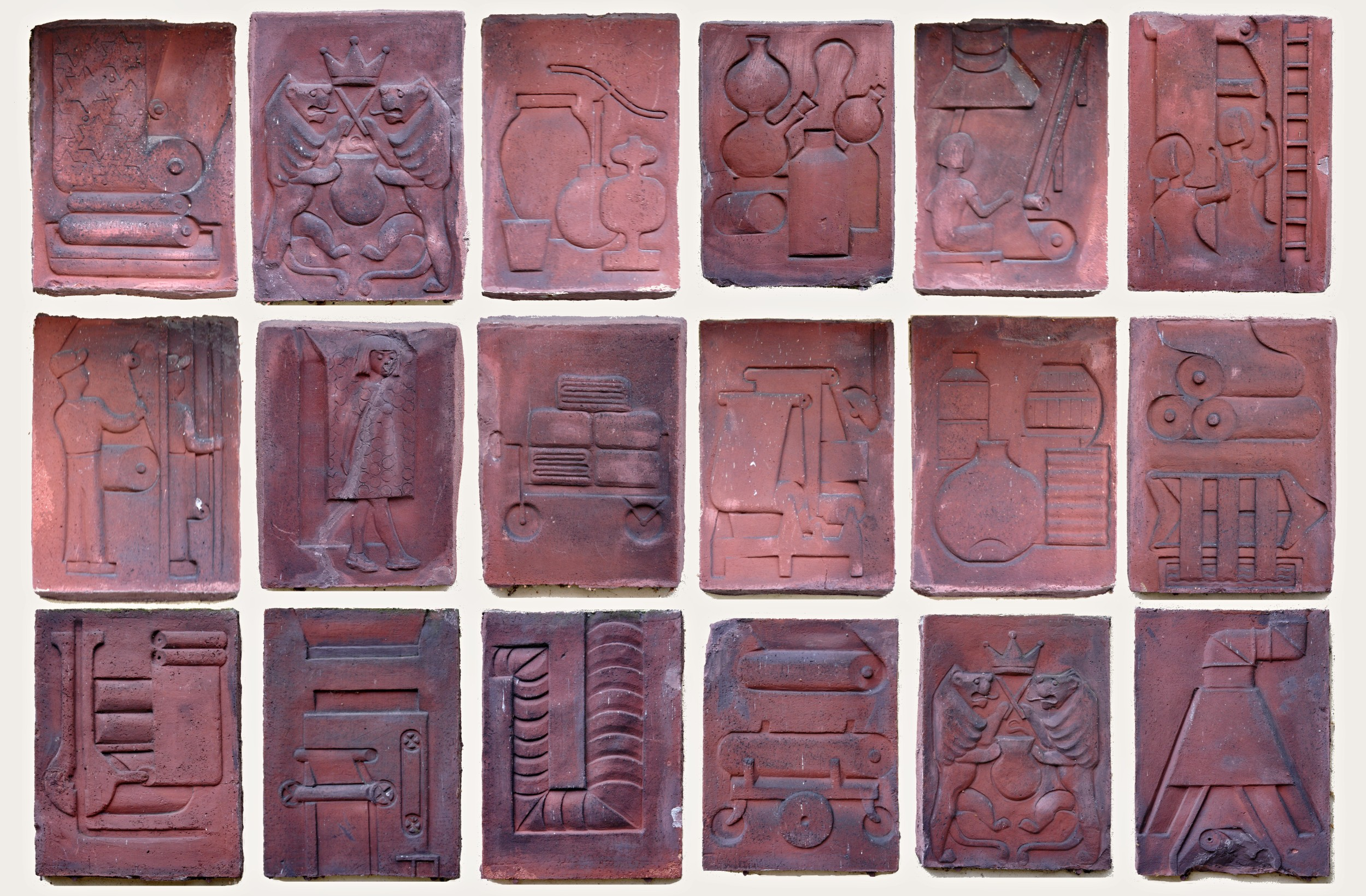 Keramikplatten, die die Herstellung von Kunstseide darstellen, 1949 von Hans Peter Feddersen und Kurt Bauer zur Dekoration mehrerer Werkstore der Paul-Spindler-Werke (vormals Kampf & Spindler) in Hilden geschaffen (Fotomontage)